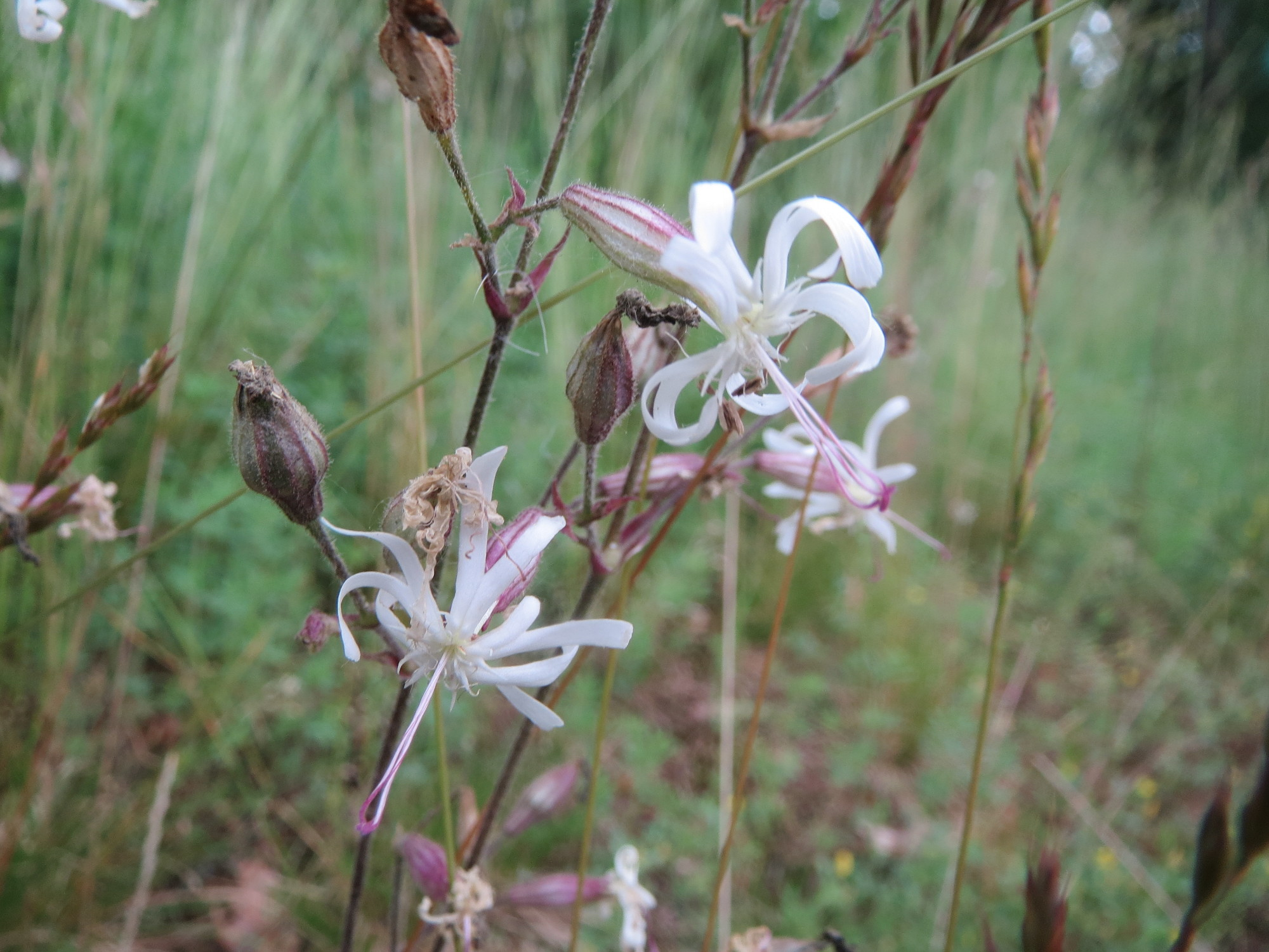 Nickendes Leimkraut (Silene nutans) auf dem Dreieichenbuckel im Naturschutzgebiet „Oftersheimer Dünen“